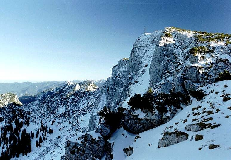 Nordwand der Benediktenwand (1801 m), Bayerische Voralpen, selbst fotografiert, GNU-FDL